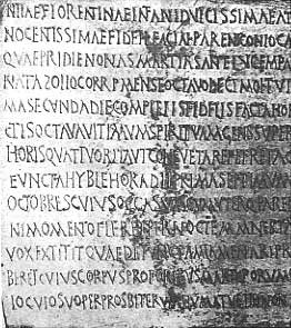 Epigrafe Romana di IV secolo d.C. di Iulia Fiorentina, esposta al Museo del Louvre